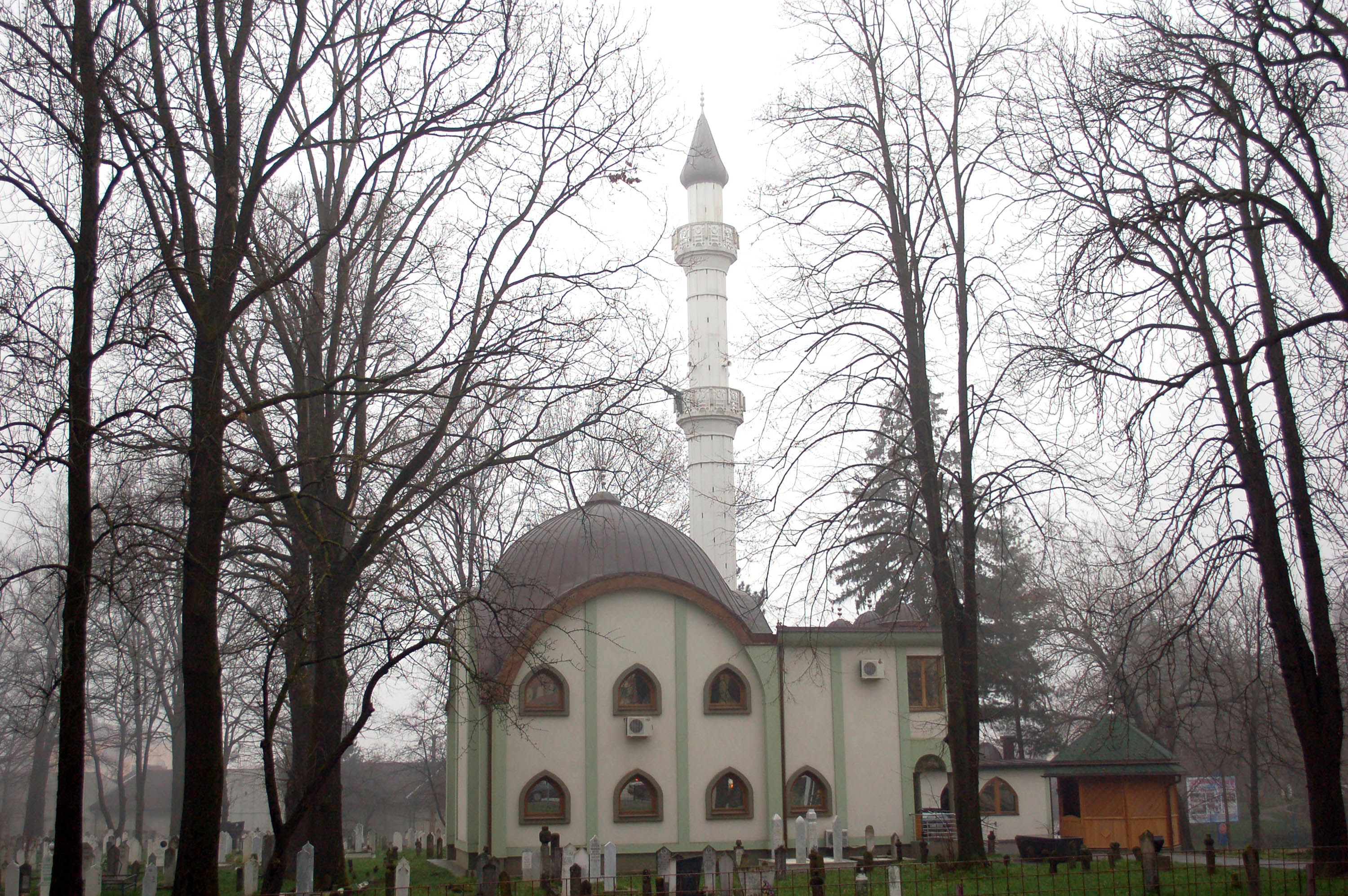 Prnjavor harem gradske dzamije This image was uploaded as part of Trace of Soul 2015.